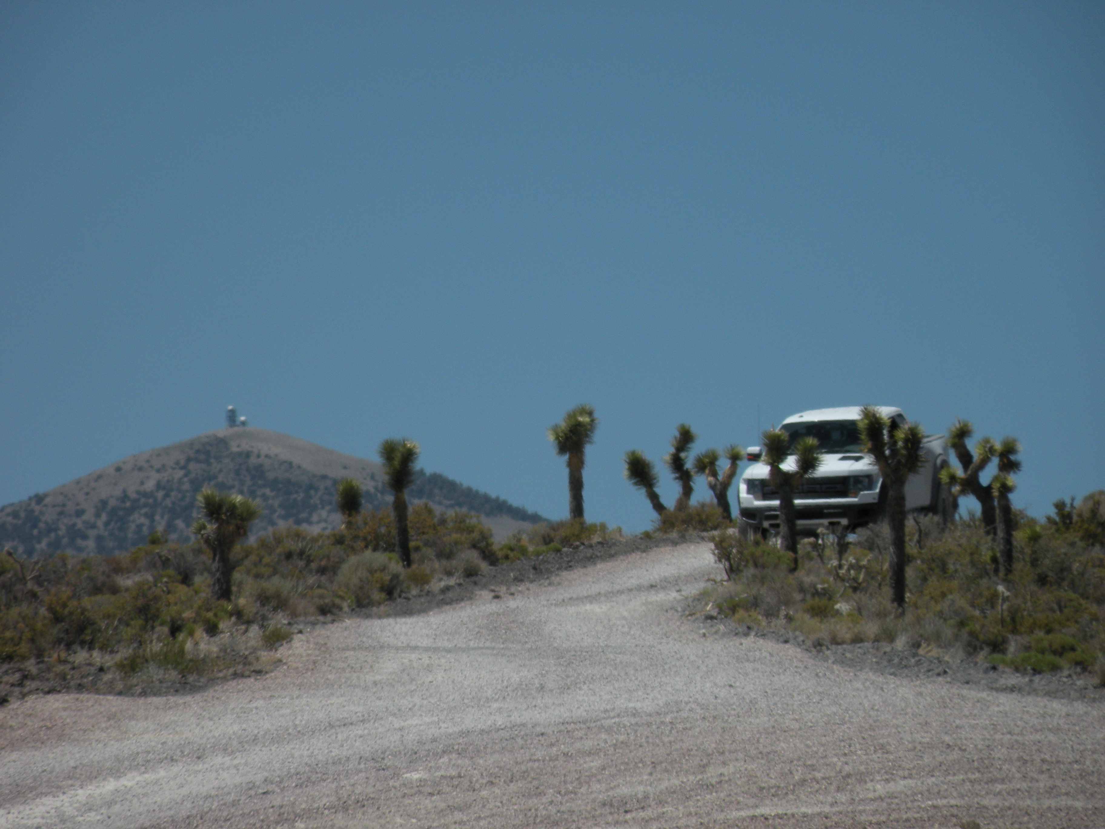 Véhicule de sécurité à la zone 51